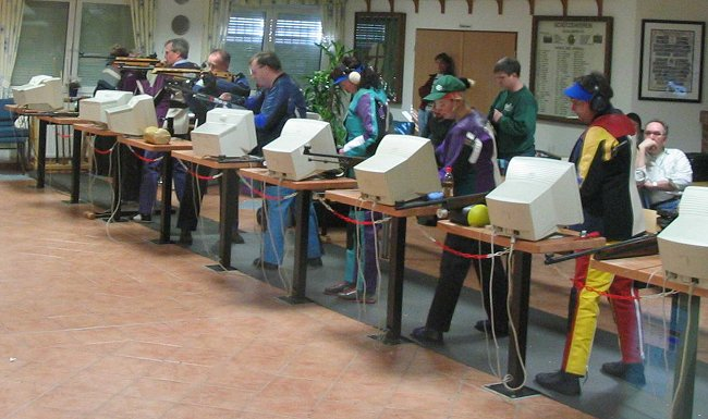 Zimmerstutzen-Wettkampf, Bezirksmeisterschaft des Dachverbandes Oldenburger Schützenbund in Sedelsberg